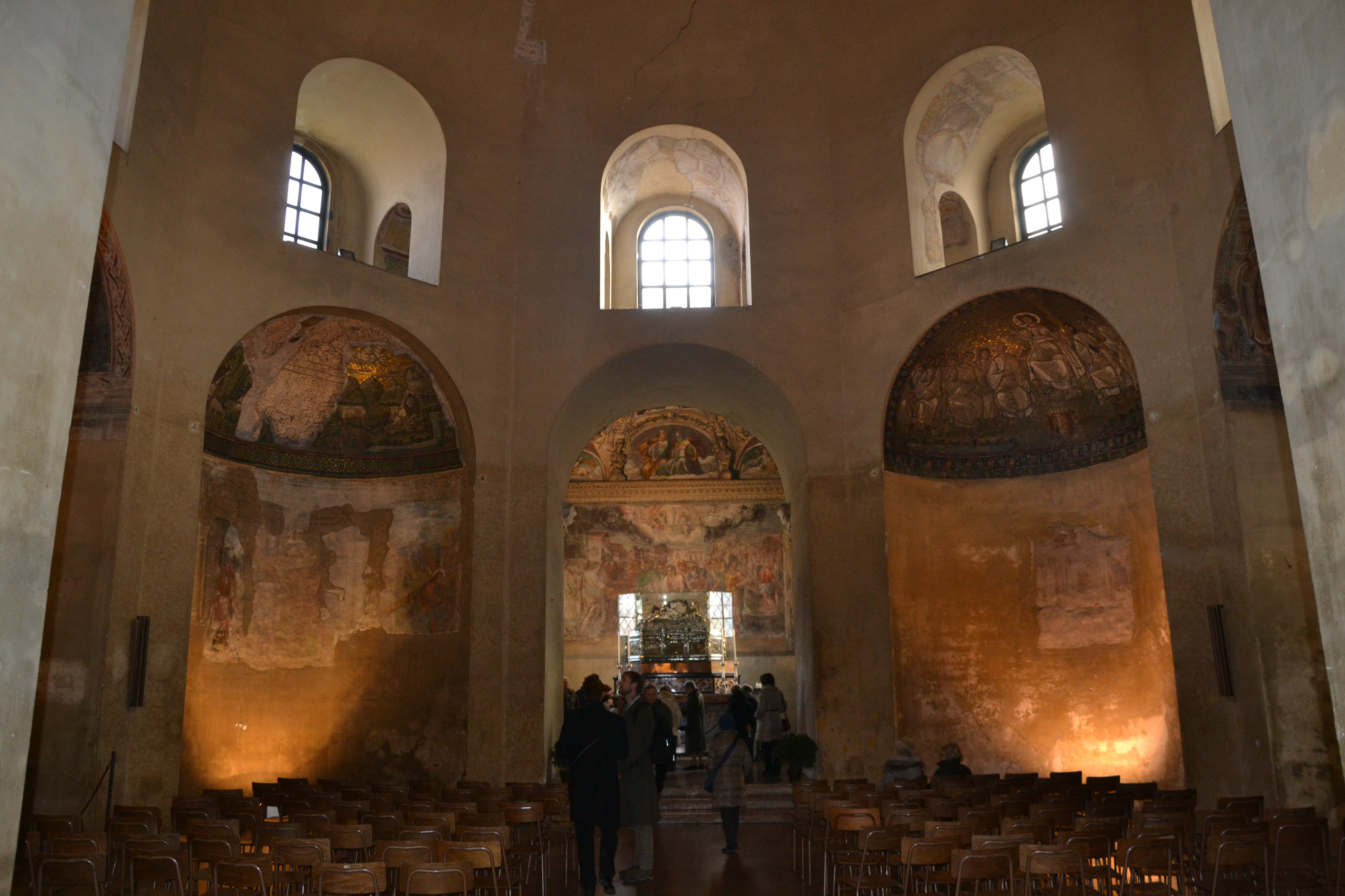 L'ambiente ottagonale a nicchioni della Cappella di sant'Aquilino della Basilica di San Lorenzo Maggiore a Milano è quello originario della basilica paleocristiana del sec. IV d.C. Si pensa che fosse in origine un mausoleo imperiale (Milano era all'epoca la capitale occidentale dell'impero). Conserva ancora qualche resto degli splendidi mosaici paleocristiani.